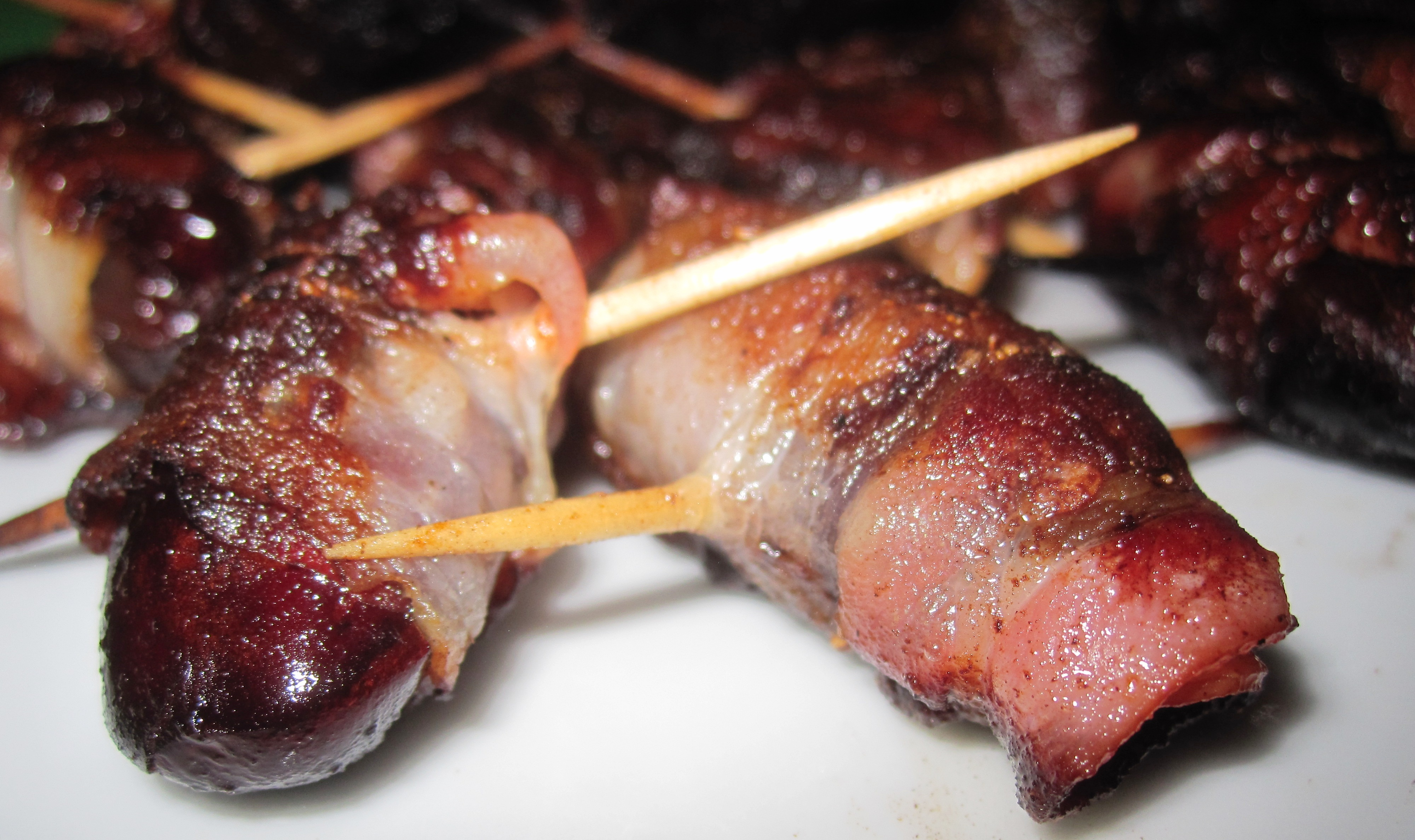 Dátiles con bacon.